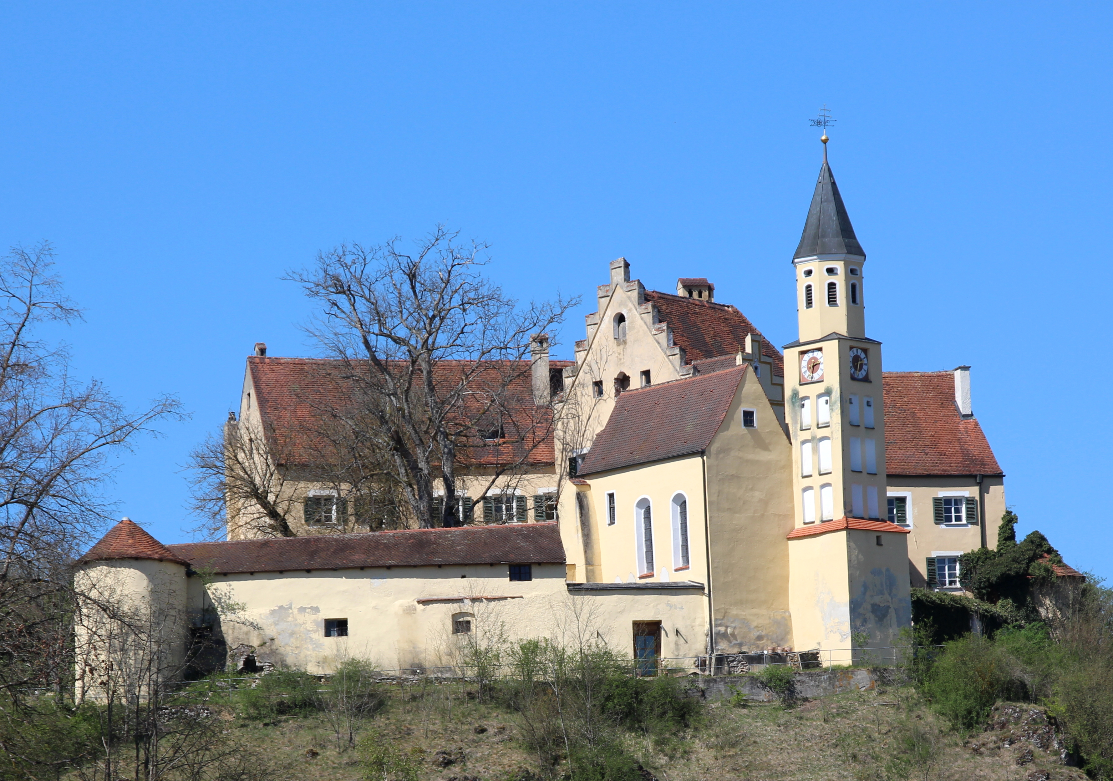 Schloss Hexenagger, Landkreis Eichstätt, Oberbayern